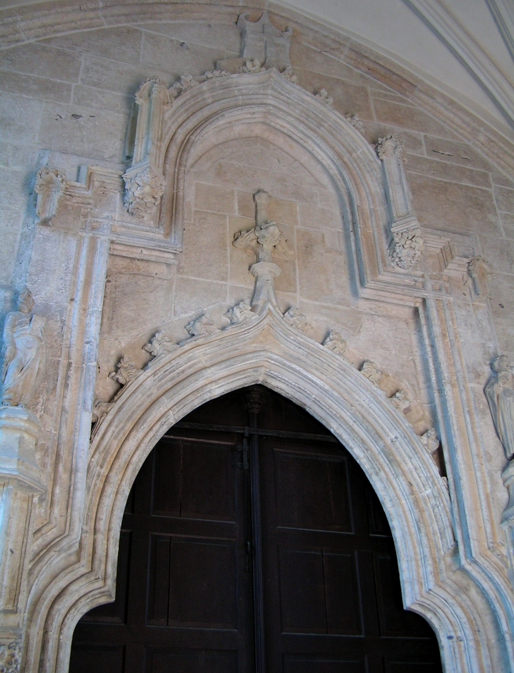 Portal w kruchcie. Kościół św. Katarzyny w Krakowie